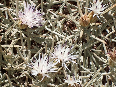 Centaurea horrida from Capo Falcone, Sardinia, Italy